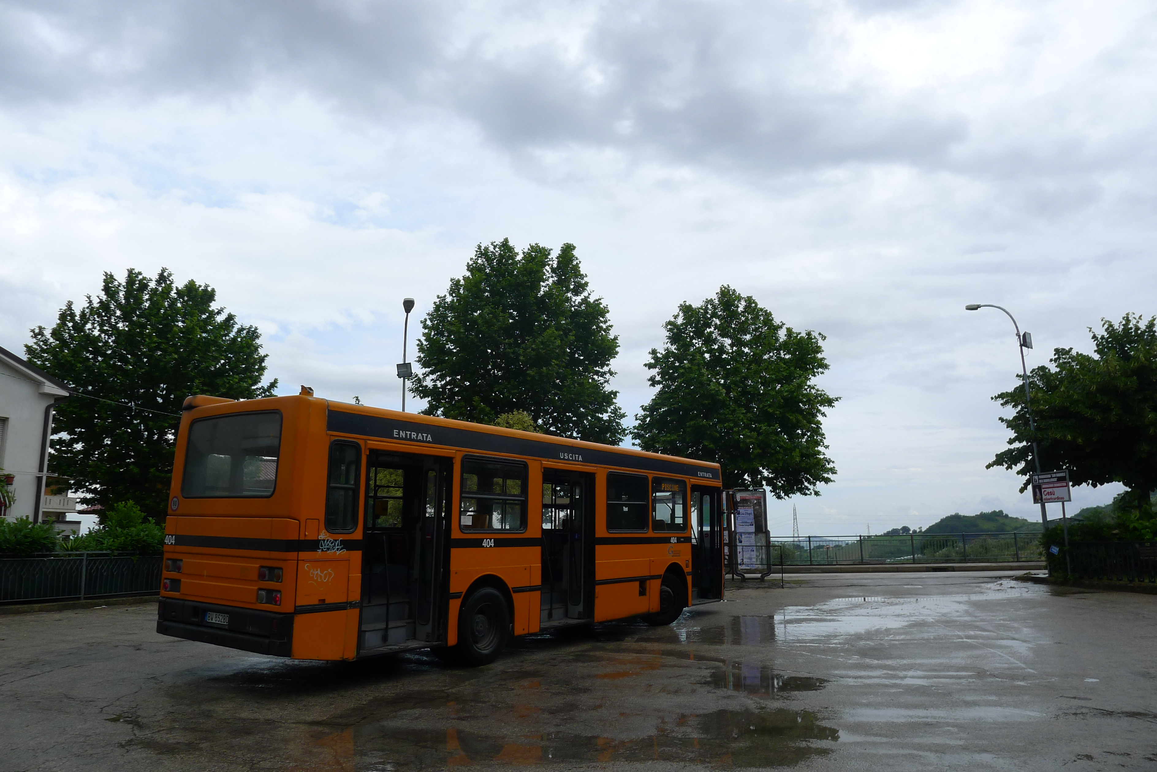 Penne bus conaprato